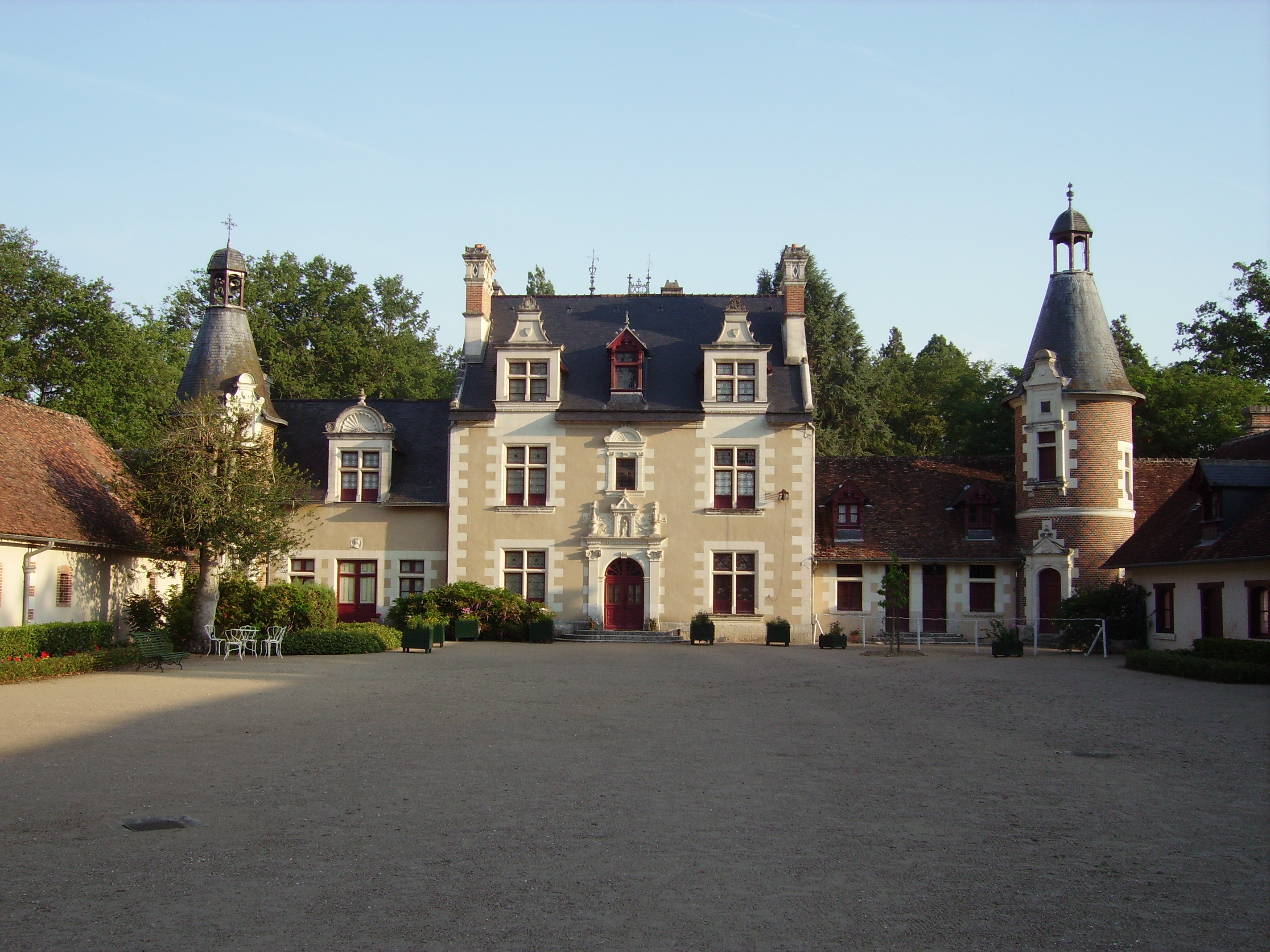 Château of Troussay, principal facade. Château de Troussay, France, Loir et Cher. Façade François Ier.